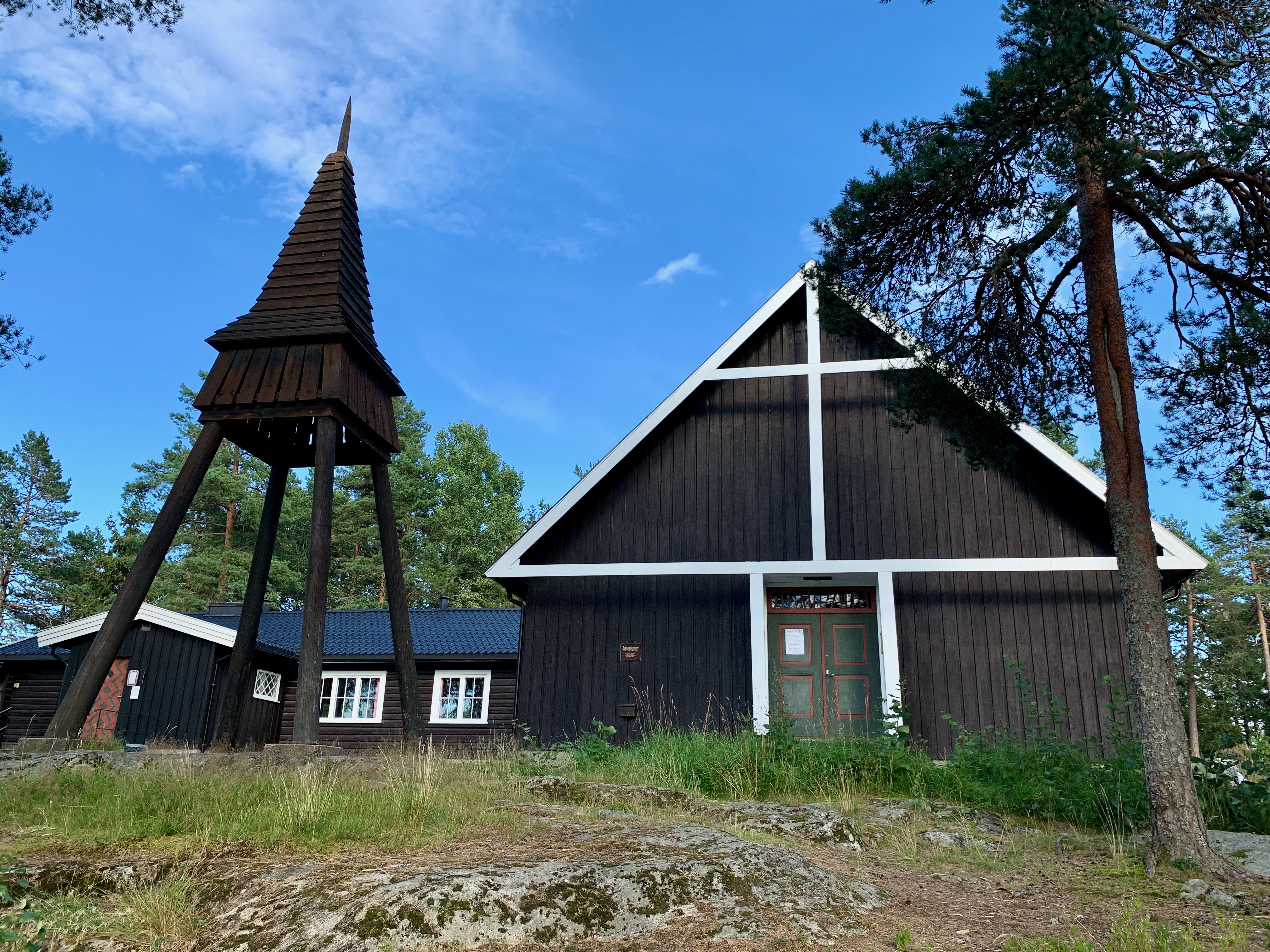 Østmarkskapellet i Østmarka i Oslo.